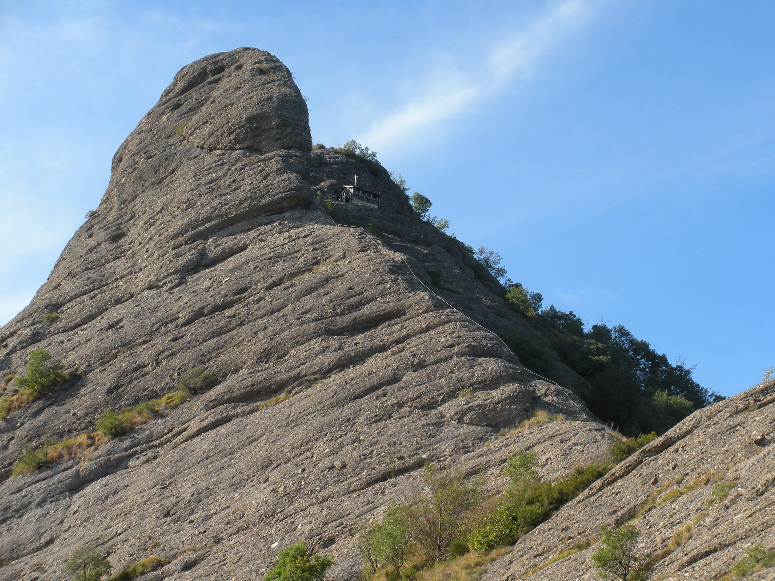 Rocche del Reopasso (prov. Genova), cima Biurca Foto propria Settembre 2009